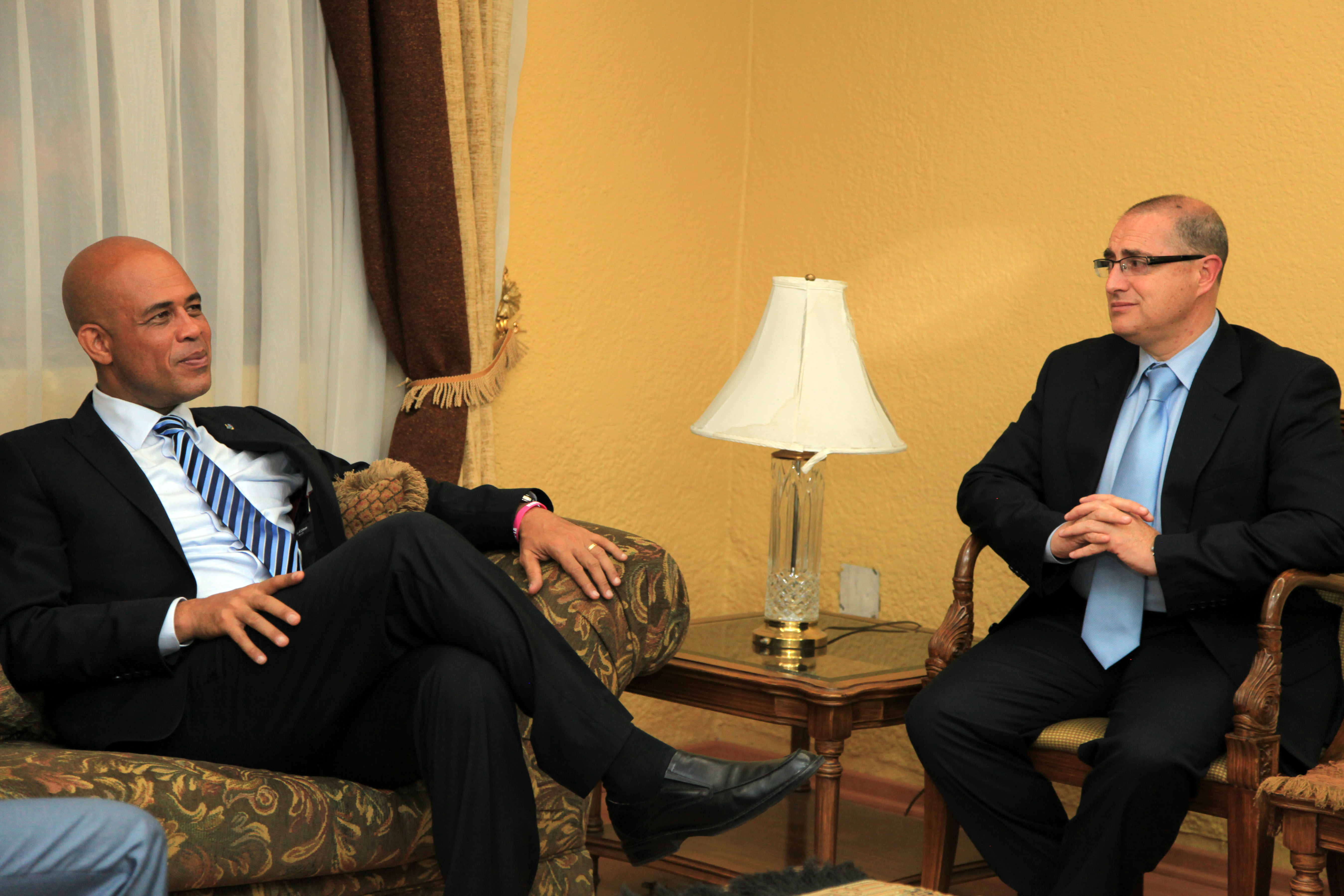 Quito (Ecuador), 10 de Julio 2012. El Viceministro de Relaciones Exteriores Dr. Marco Albuja recibió al Presidente de Haití Michel Martelly. Foto: Xavier Granja Cedeño - Ministerio de Relaciones Exteriores, Comercio e Integración.